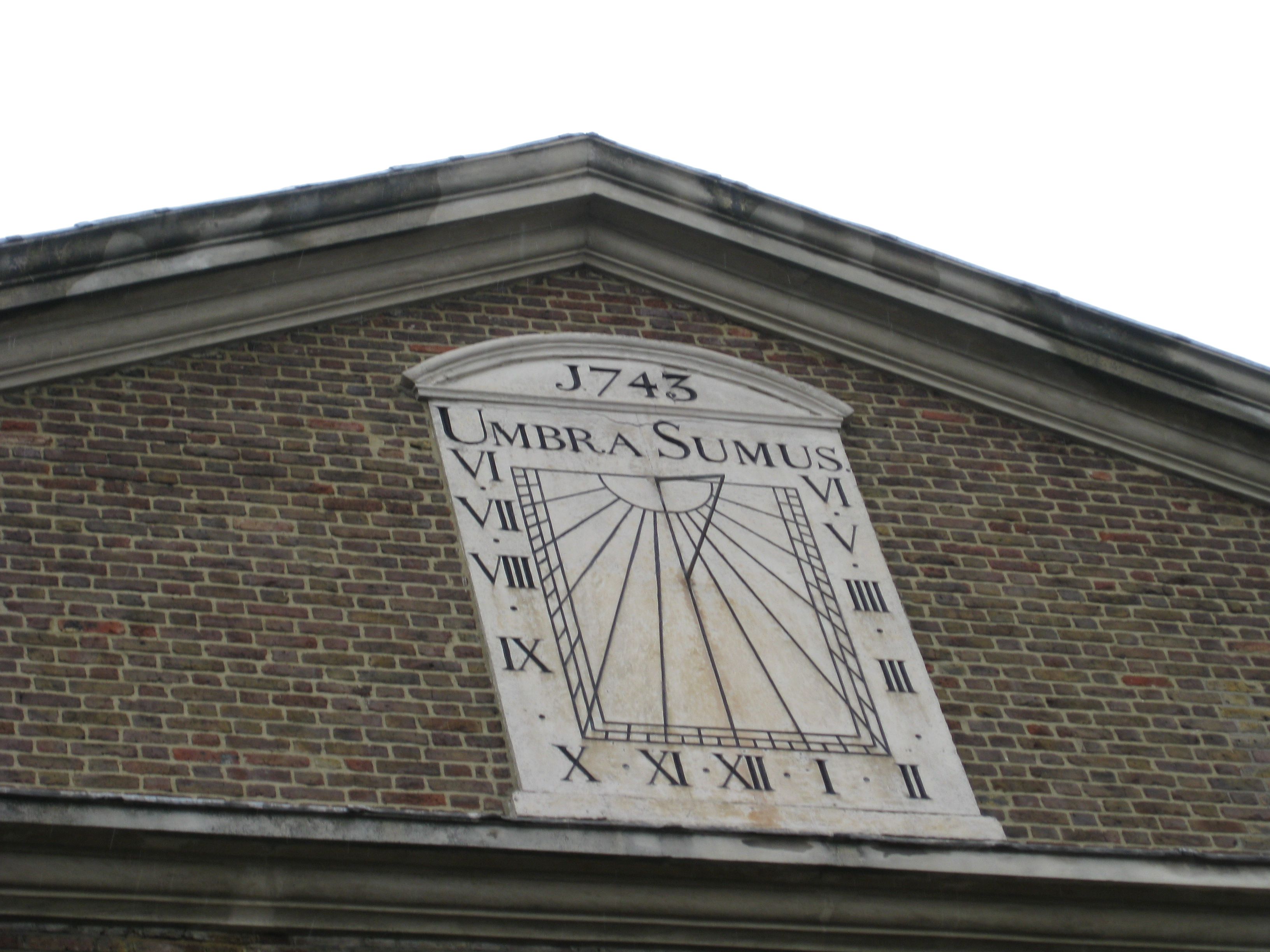 Detail Brick lane Jamme Masjid